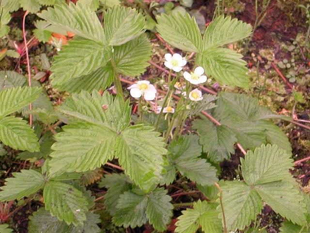 Foto einer Garten-Erdbeere (Fragaria x ananassa)